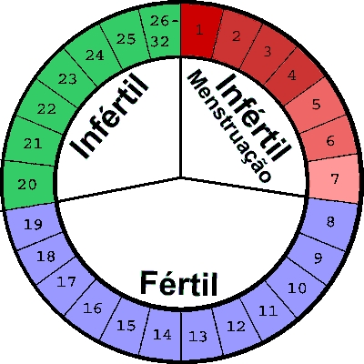 Tabelinha